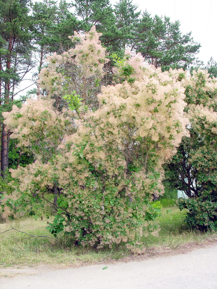 Europinis pūkenis (Cotinus coggygria) Šeima. Anakardiniai (Anacardiaceae) Foto: Algirdas, 2006 m. liepos 18 d., prie „Virvytės" poilsio bazės.